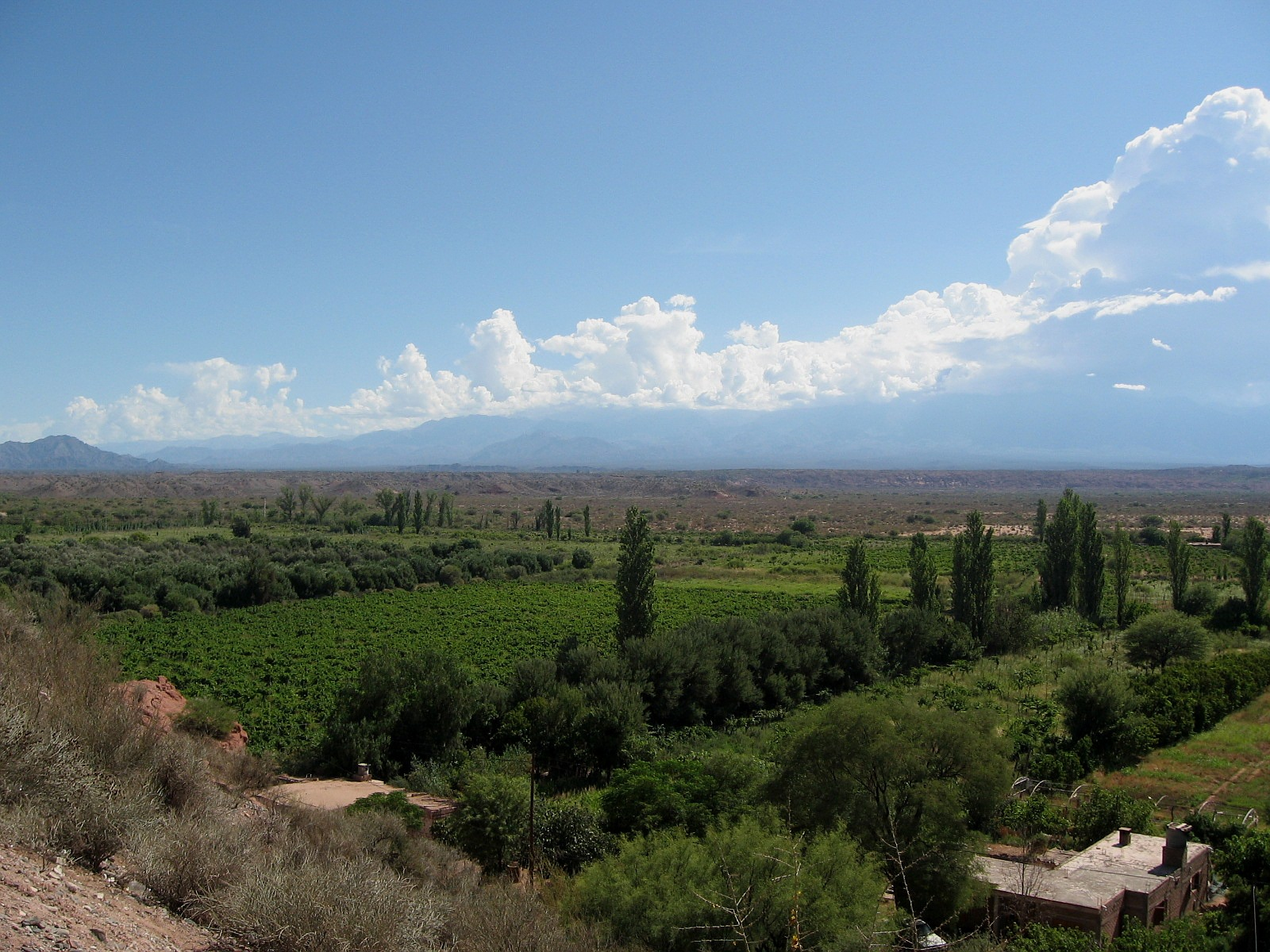 Vista de viñedos desde el mirador